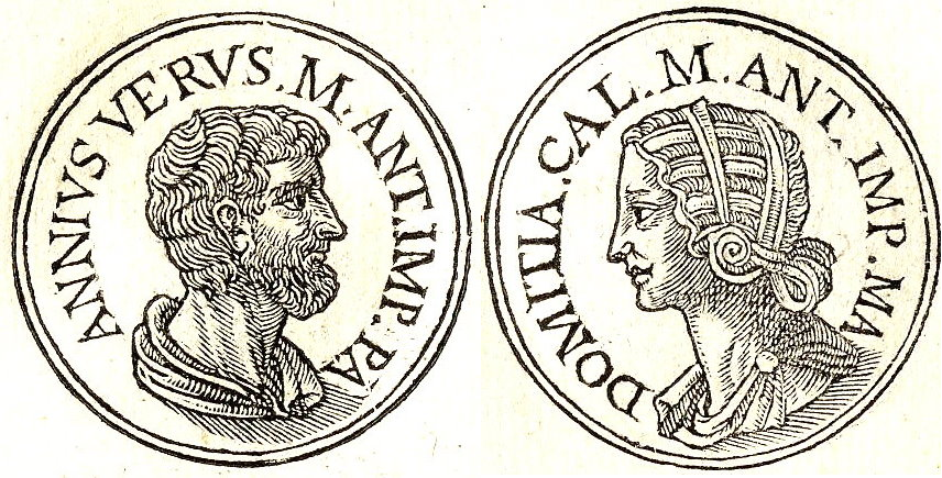 Les parents de Marc Aurèle : Marcus Annius Verus et Domitia Lucilla Minor. Depuis File:Annius Verus-praetor.jpg et File:Domitia Lucilla Minor.jpg